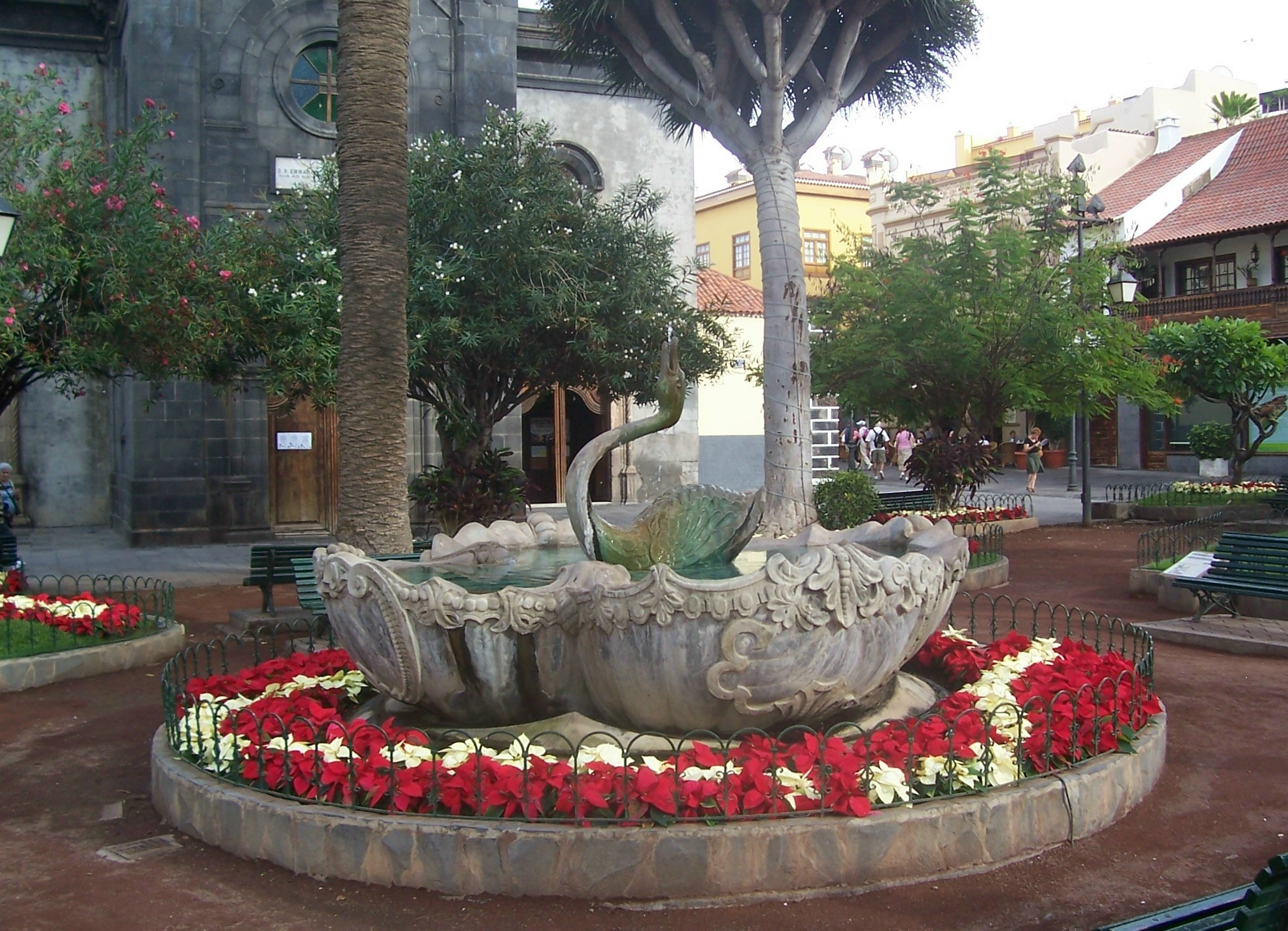 Brunnen in Puerto de la Cruz